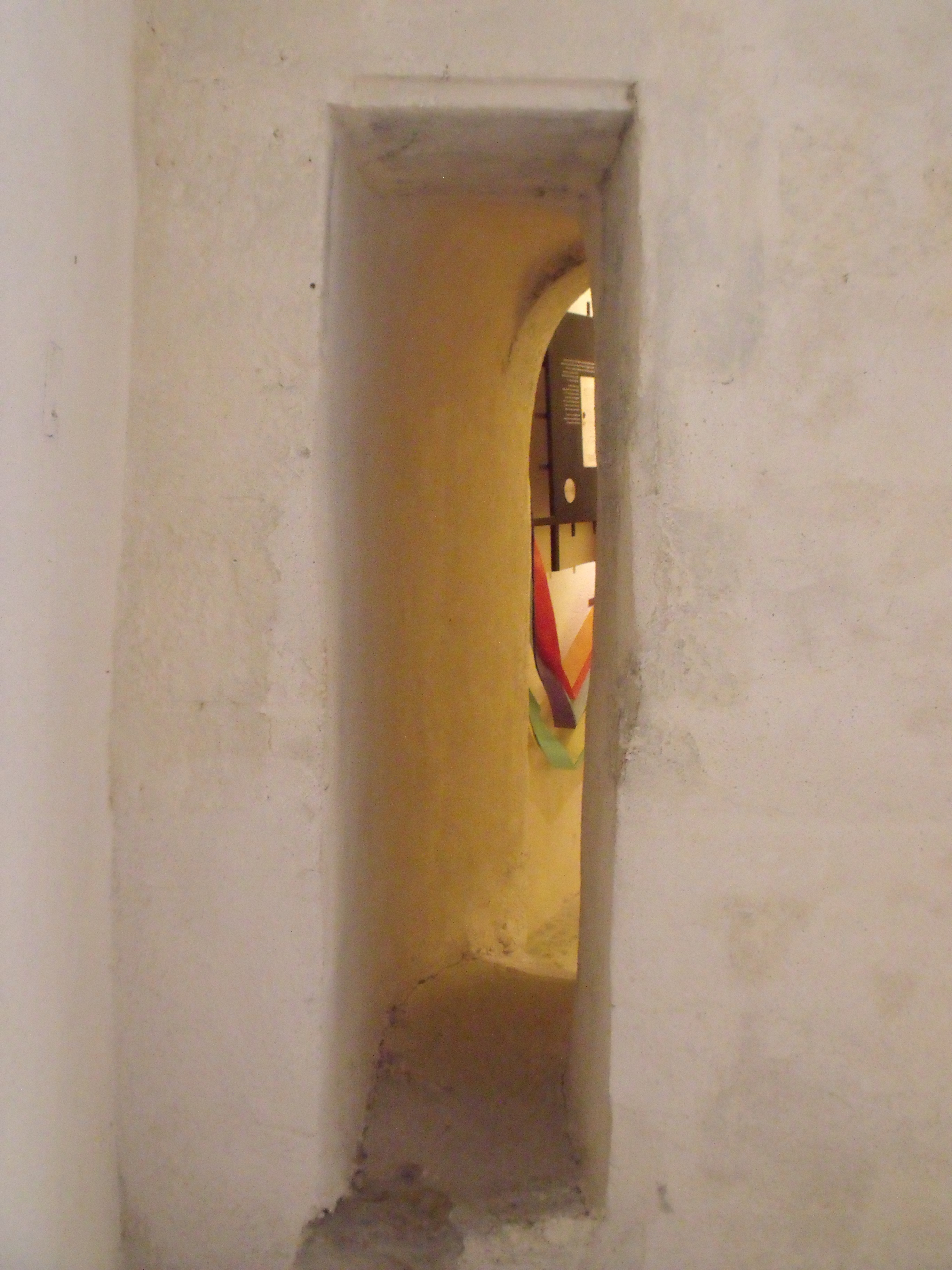 Pasadizo en el interior de la Torre de la Cadena (La Rochela) .